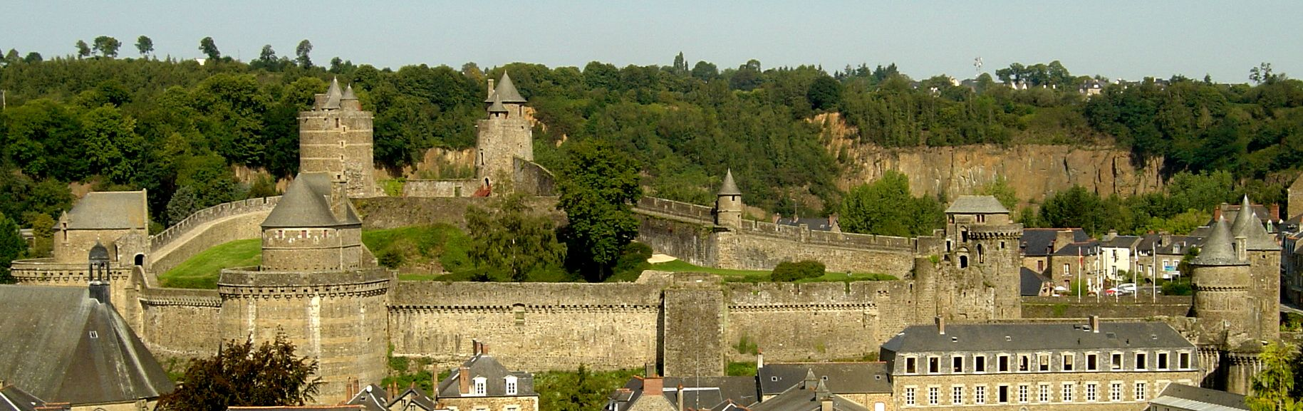 Vue générale du château de Fougères - photo personnelle prise en août 2004, publiée en GFDL pour wikipedia utilisateur:Luna04